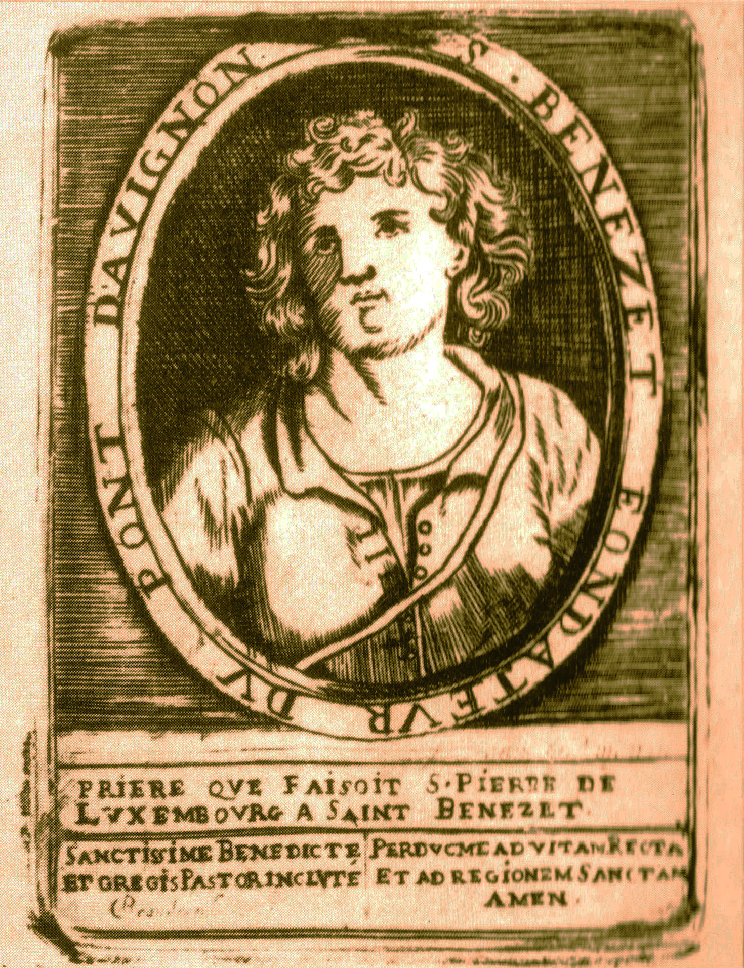 Album d'Arnavon daté du XVIIe siècle représentant Bénézet fondateur du pont d'Avignon